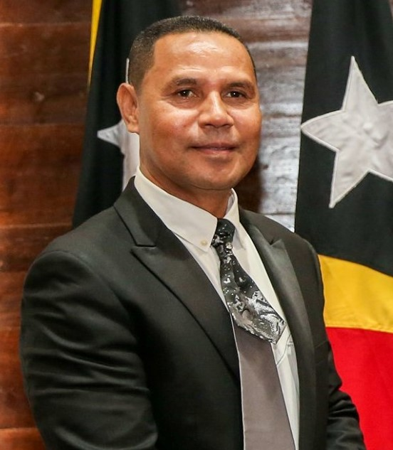 Botschafter Hermenegildo Lopes bei der Vereidigung